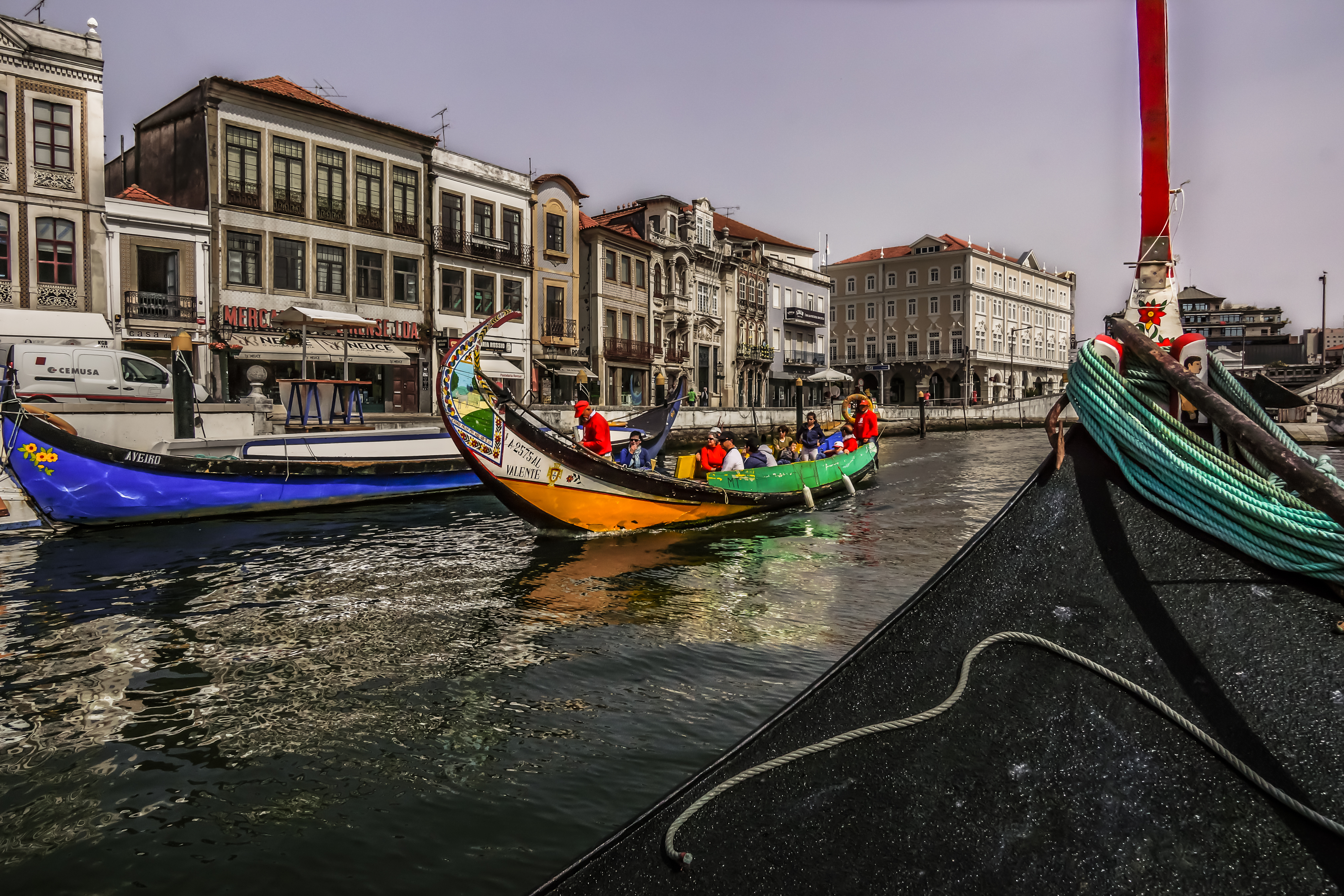 Aveiro - Portugal